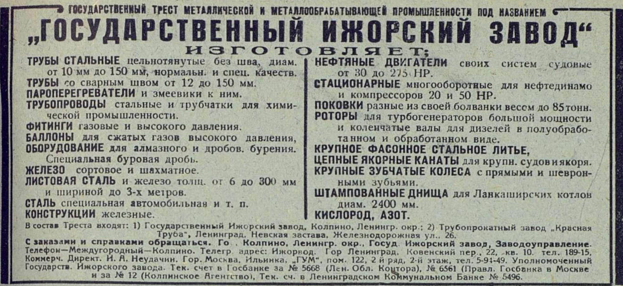 Реклама Ижорского завода, 1930 год.